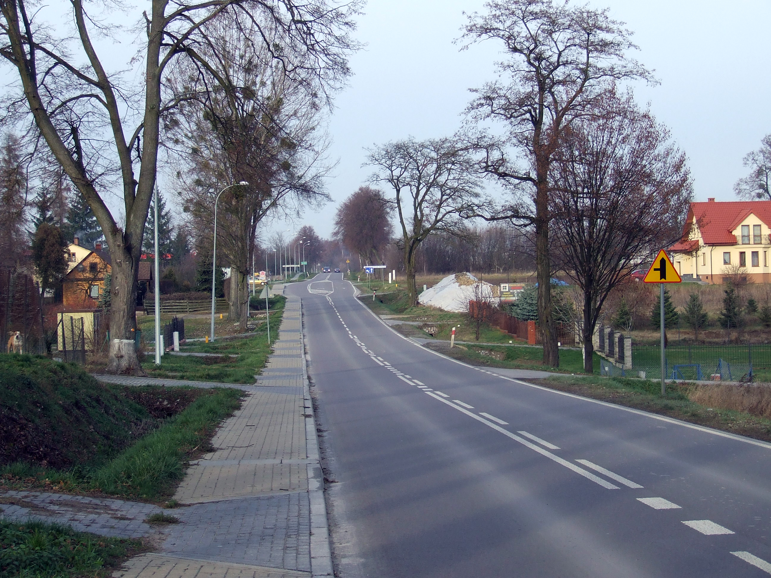 Strzelce w gminie Nałeczów - droga wojewódzka nr 826